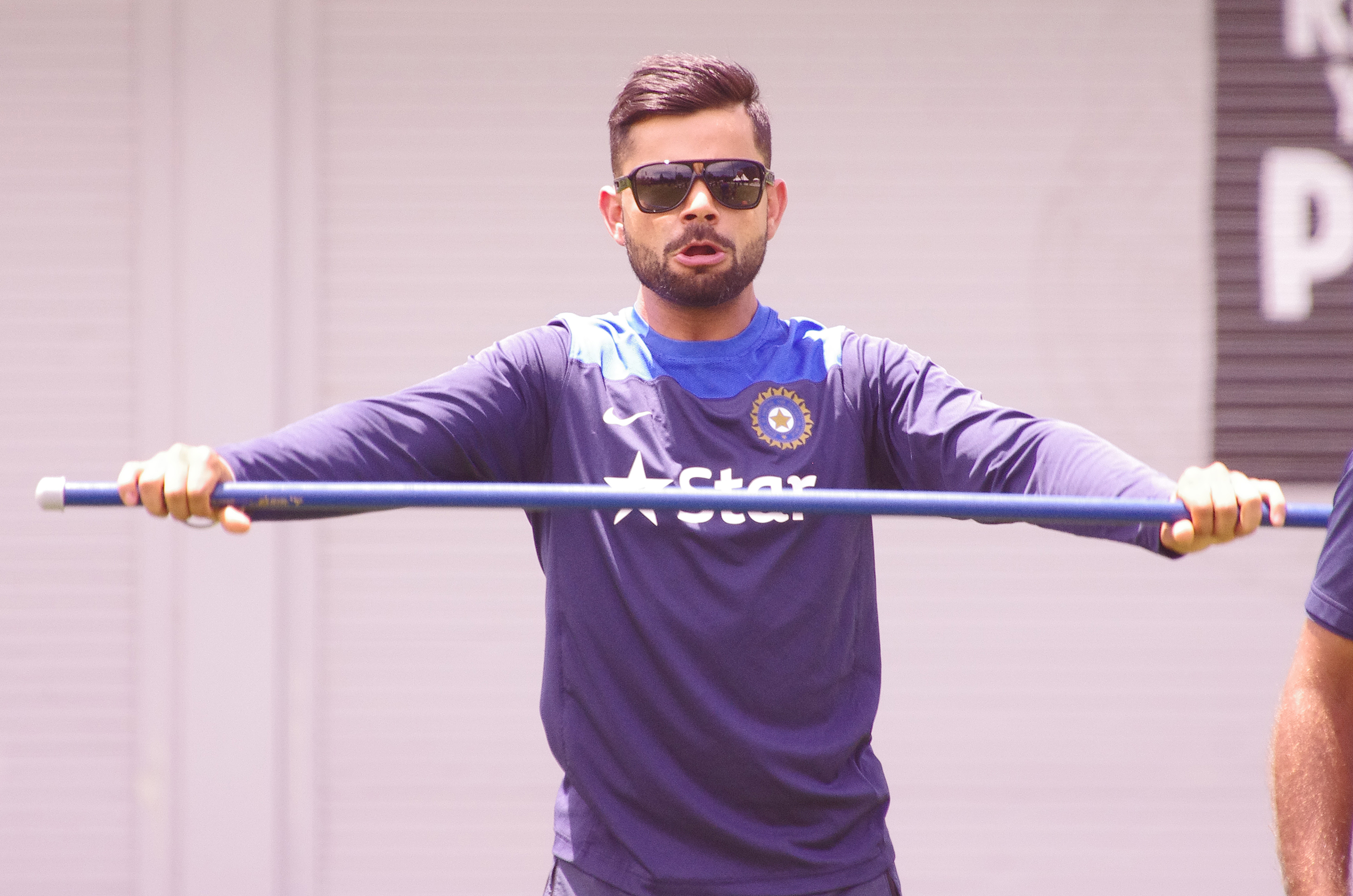 VIRAT KHOLI